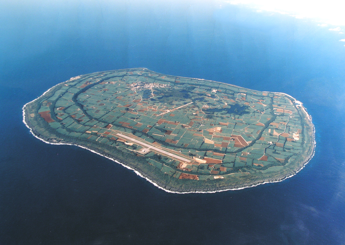 Minamidaito_AirSmall.jpg